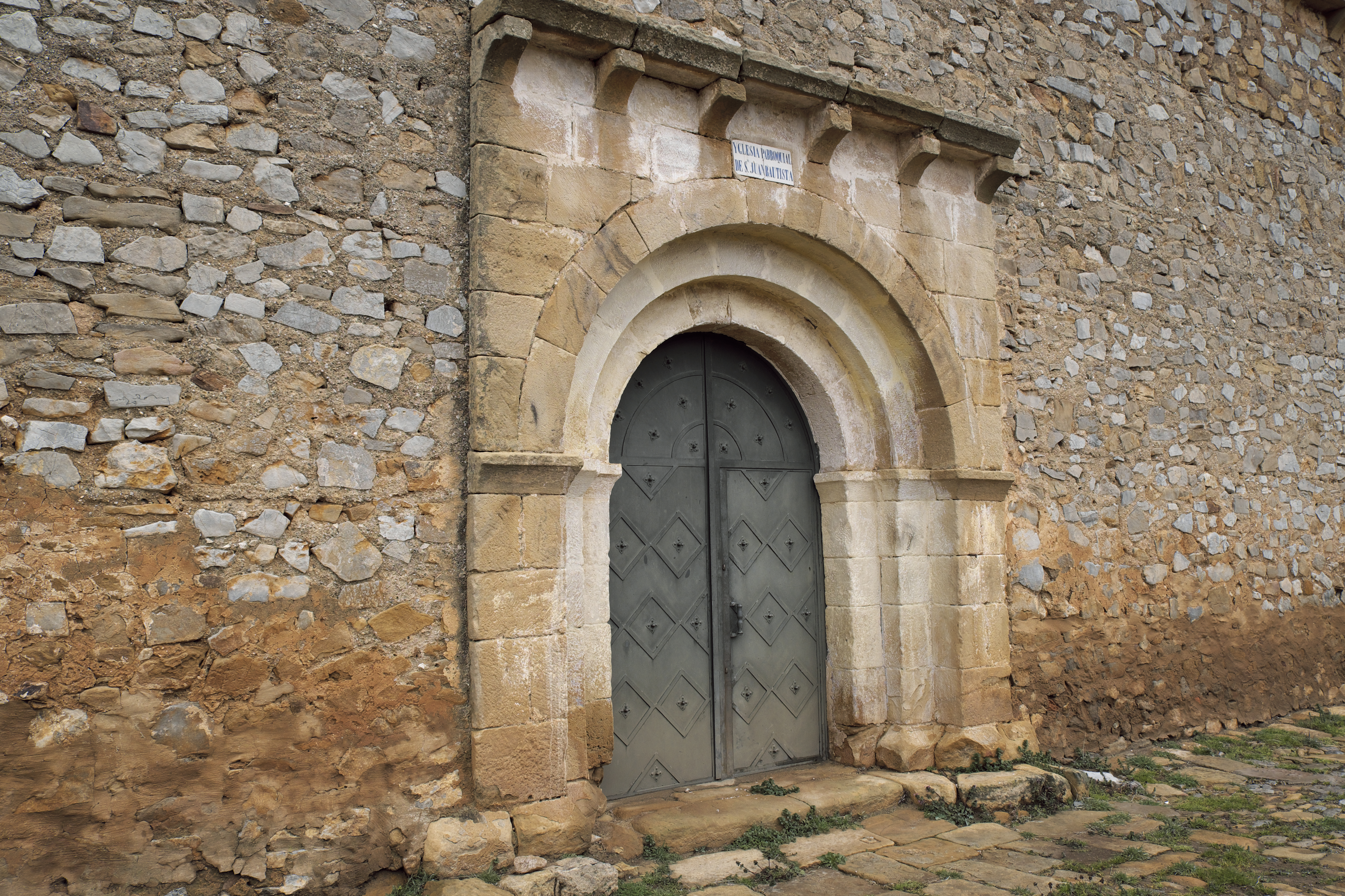 Kirche San Juan Bautista in Aldealpozo in der Provinz Soria (Kastilien-León/Spanien), romanisches Archivoltenportal